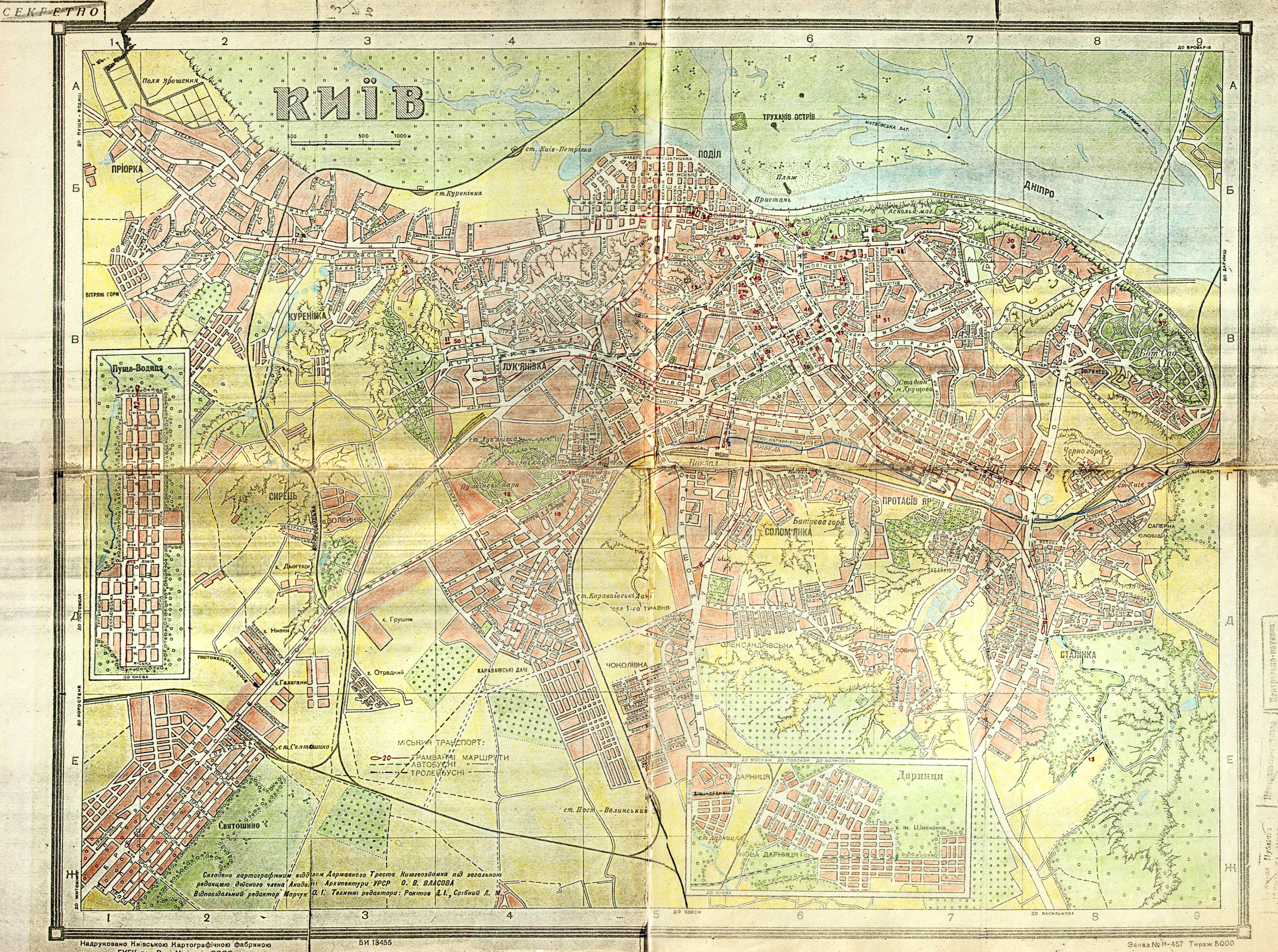 Мапа Києва 1947 року, складена картографічним відділом Державного Треста Київгеозйомка